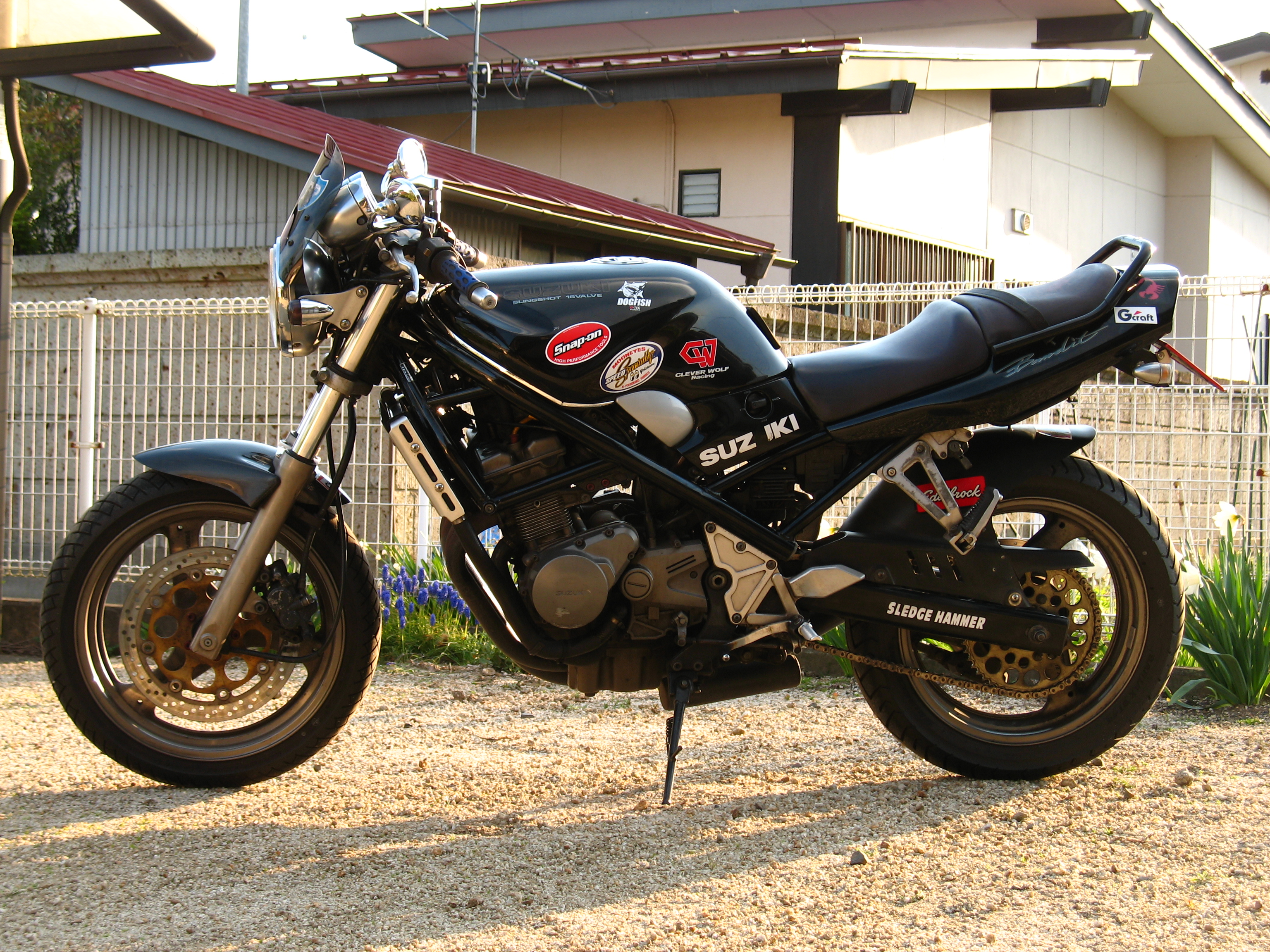 GSF250 GJ74A (LEFT SIDE)